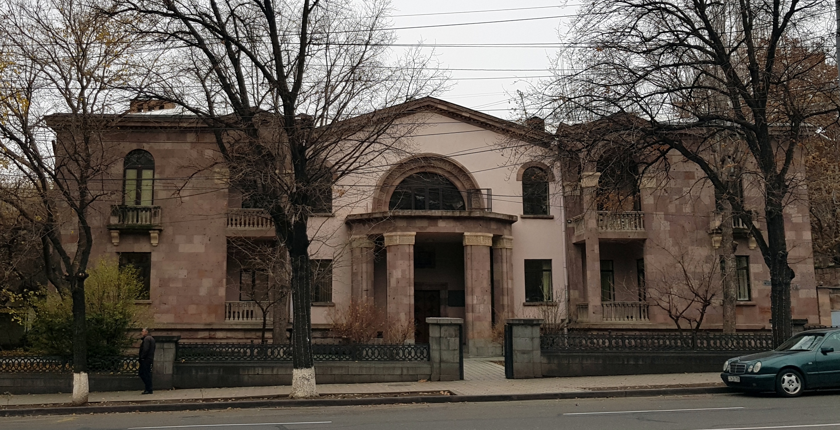 Building of Architects Union of Armenia, Cultural heritage monument in Yerevan on Baghramyan Avenue 6/161